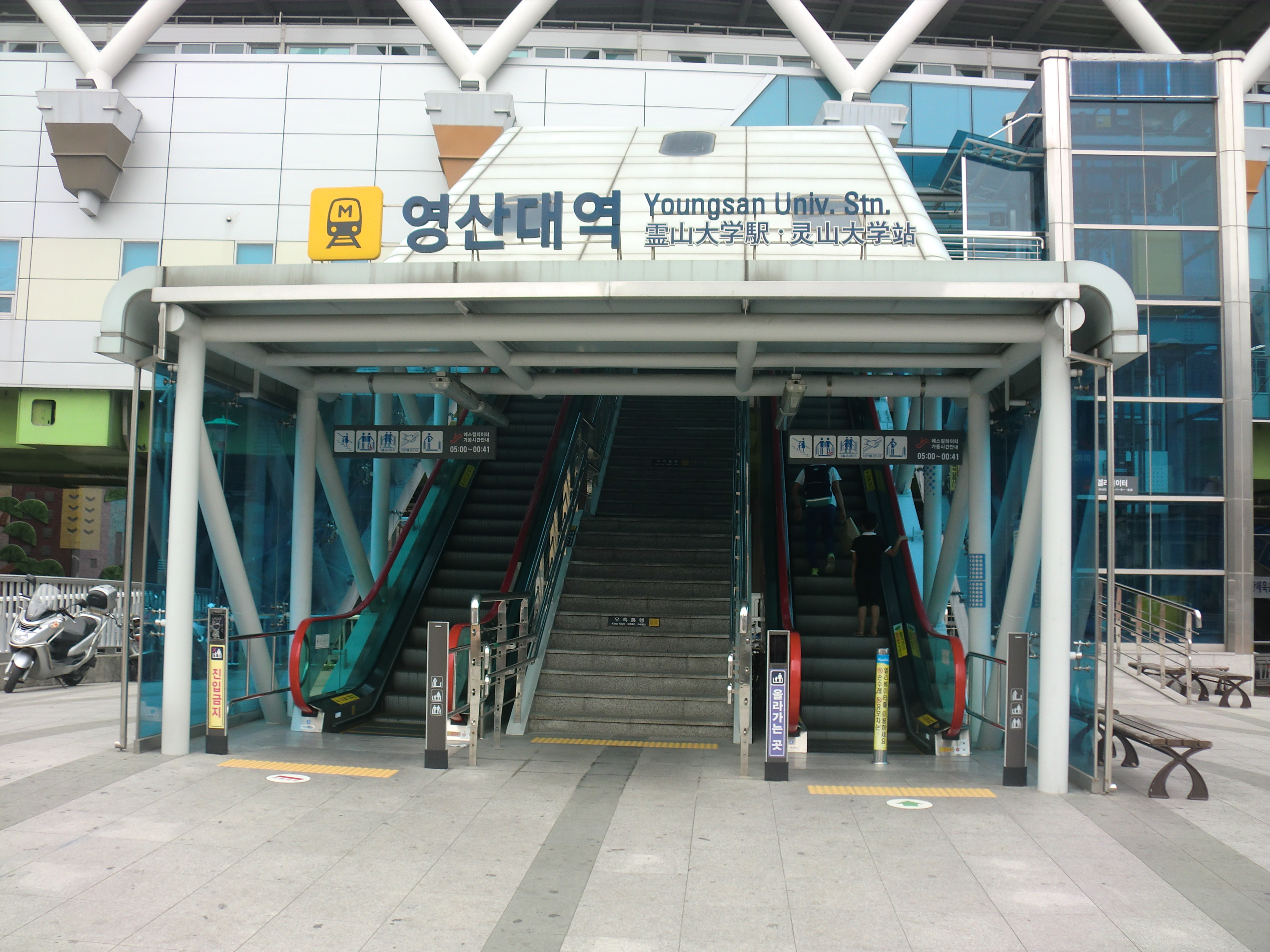 부산도시철도 4호선 영산대역 2번출구